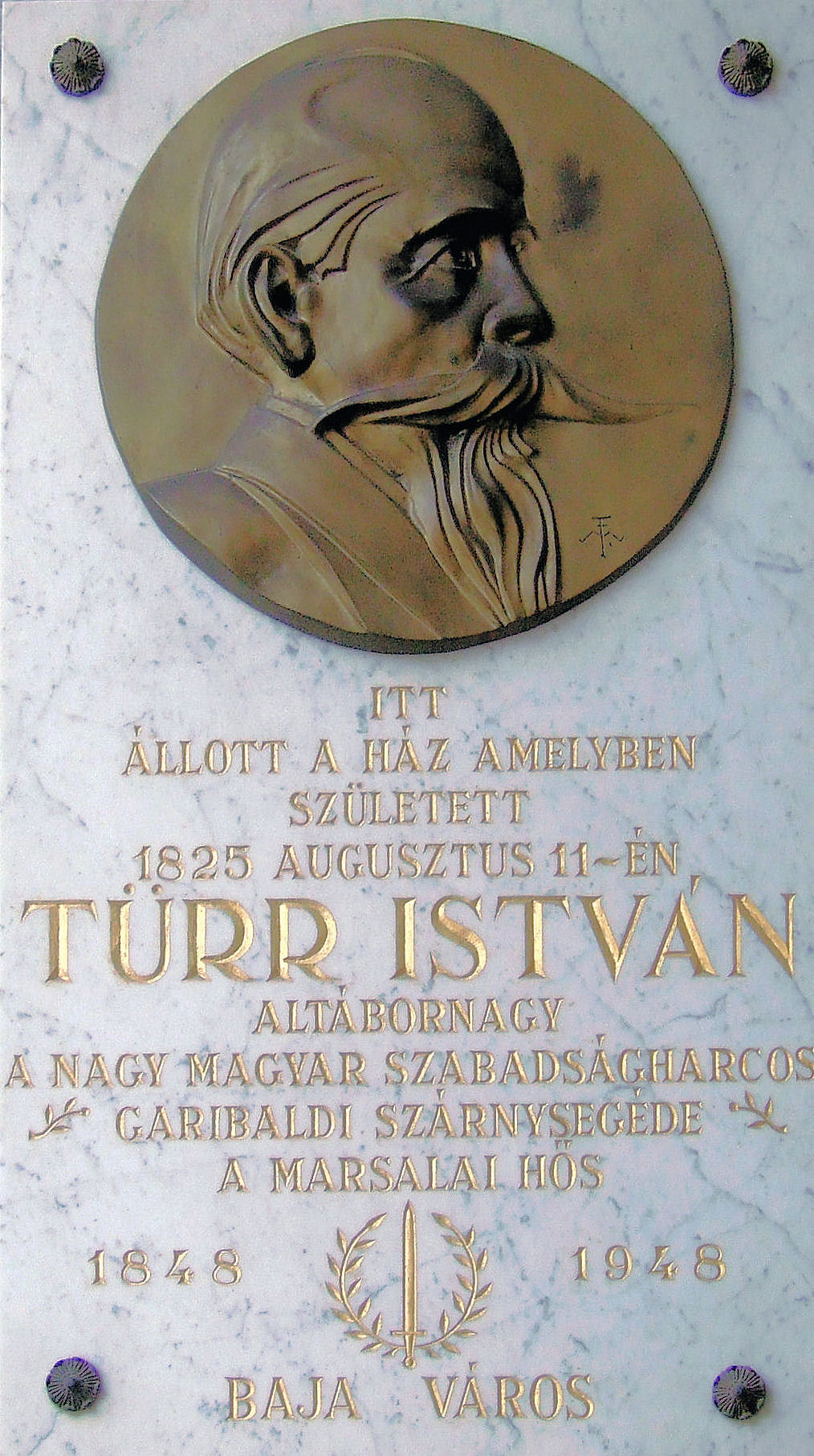 Emléktábla Baján, Türr István szülőházának helyén